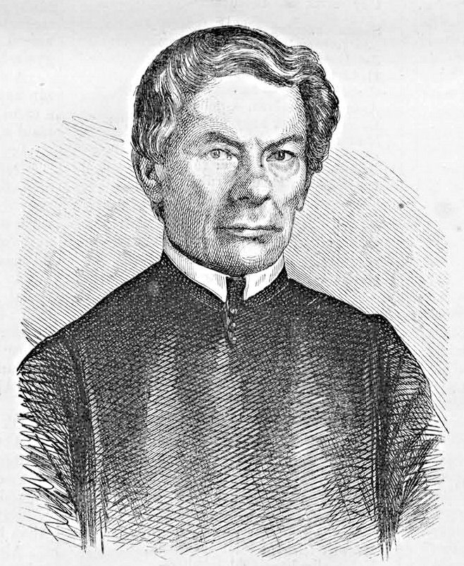 Czinár Mór Pál (1787–1875) bölcsészdoktor, bencés rendi szerzetes, a Magyar Tudományos Akadémia levelező tagja (Vasárnapi Ujság, 1864. január 31.)